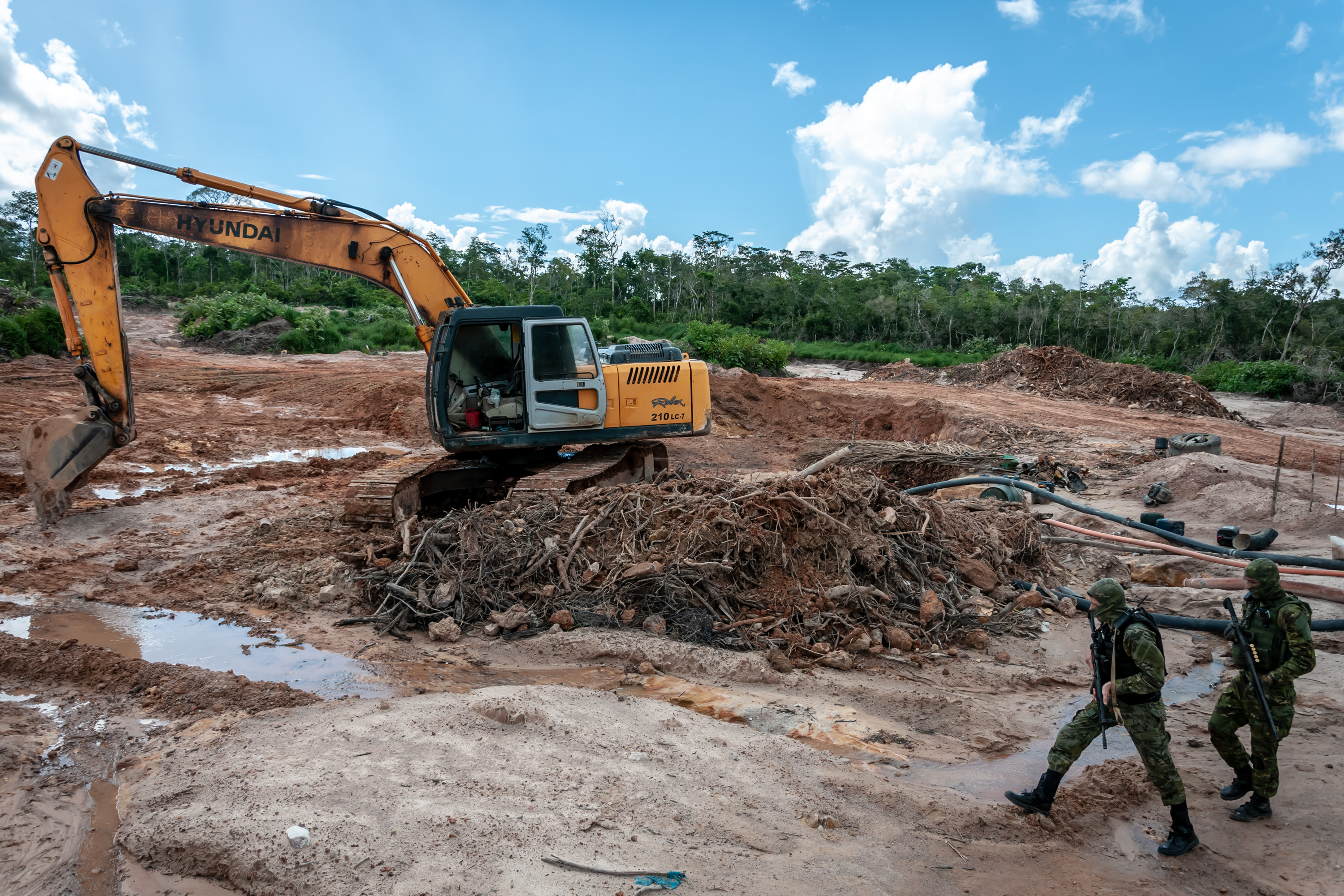 Grupo Especializado de Fiscalização (GEF) do Ibama combate desmatamento e garimpo de cassiterita na Terra Indígena Tenharim do Igarapé Preto, Amazonas Foto: Vinícius Mendonça/Ibama Mais informações